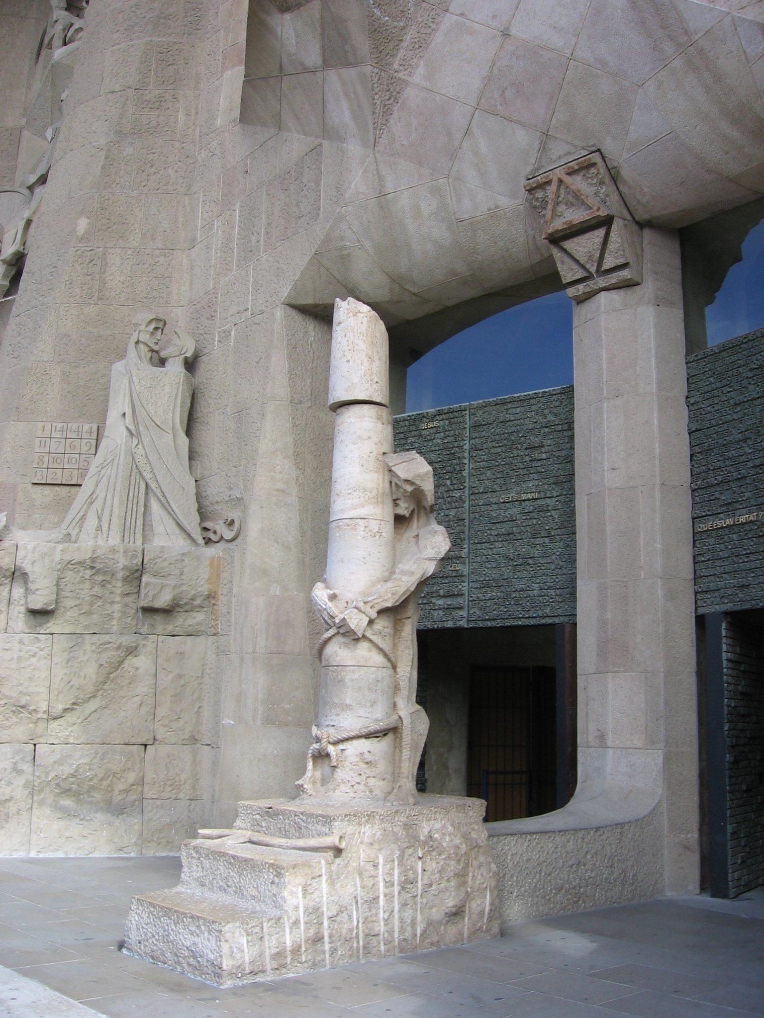 Sagrada Familia - Fachada de la Pasión - Flagelación